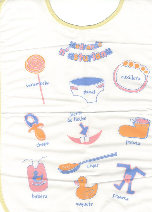 Baberu de la campaña "Medrando n'asturianu"